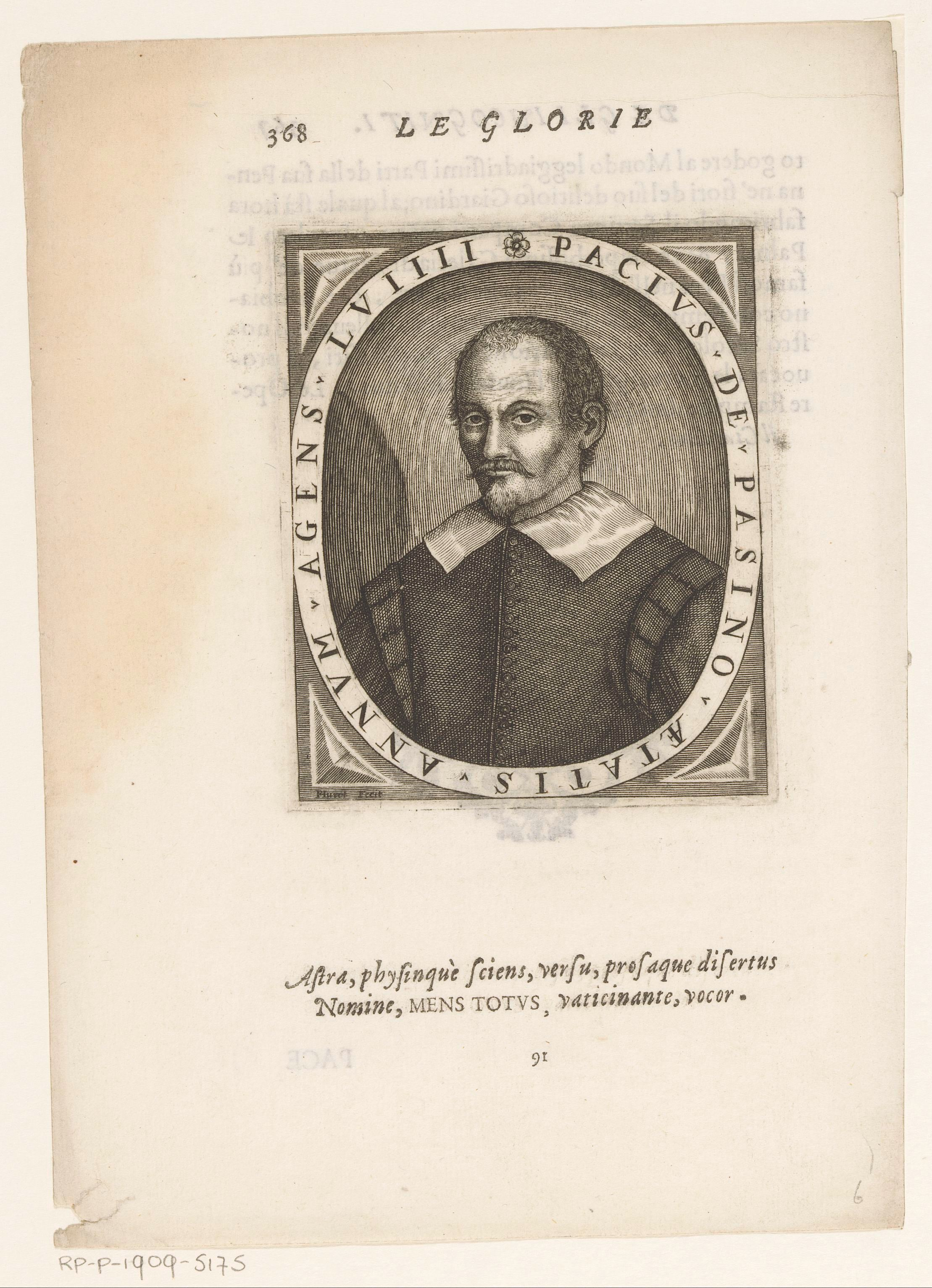 IdentificatieTitel(s): Portret van dichter en filosoof Pace PasiniObjecttype: prent boekillustratie Objectnummer: RP-P-1909-5175Opschriften / Merken: verzamelaarsmerk, verso, gestempeld: Lugt 2228VervaardigingVervaardiger: prentmaker: Giacomo Piccini (vermeld op object)uitgever: Francesco ValvasensePlaats vervaardiging: VenetiëDatering: 1647Fysieke kenmerken: gravure; tekst in boekdruk op recto en versoMateriaal: papier Techniek: graveren (drukprocedé) / boekdrukAfmetingen: plaatrand: h 111 mm × b 94 mmblad: h 229 mm × b 167 mmToelichtingPrent uit de publicatie: Loredan, Giovan Francesco. Le glorie degli Incogniti. Venetië: Francesco Valvasense, 1647, p. 368.OnderwerpWat: historical personswriter, poet, authorWie: Pace PasiniVerwerving en rechtenVerwerving: aankoop 1905Copyright: Publiek domein